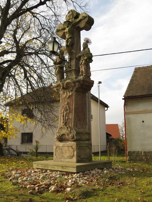 Sloup se sousoším Kalvárie, ve středu obce, naproti čp. 15, Zelenecká Lhota.